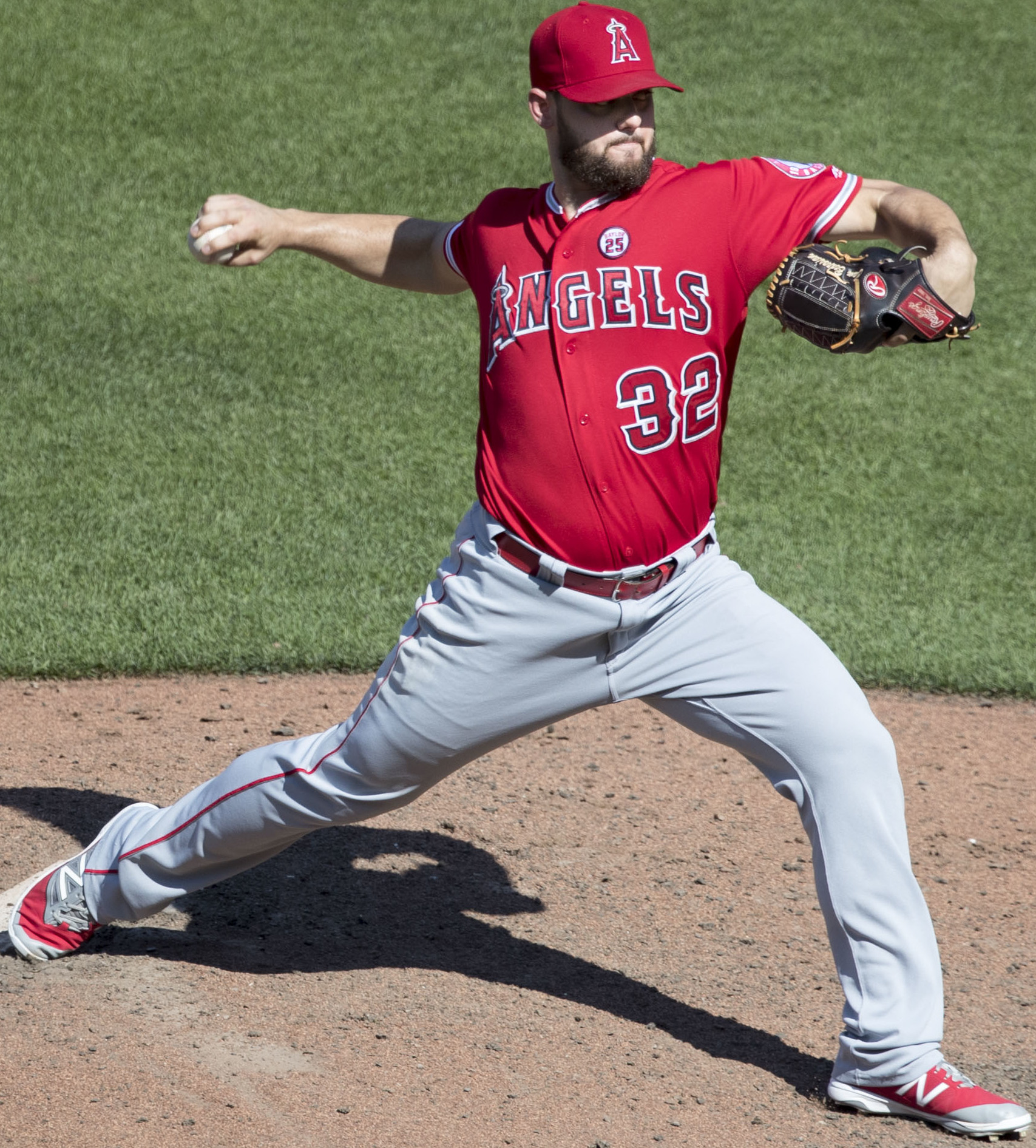 Angels at Orioles 8/20/17